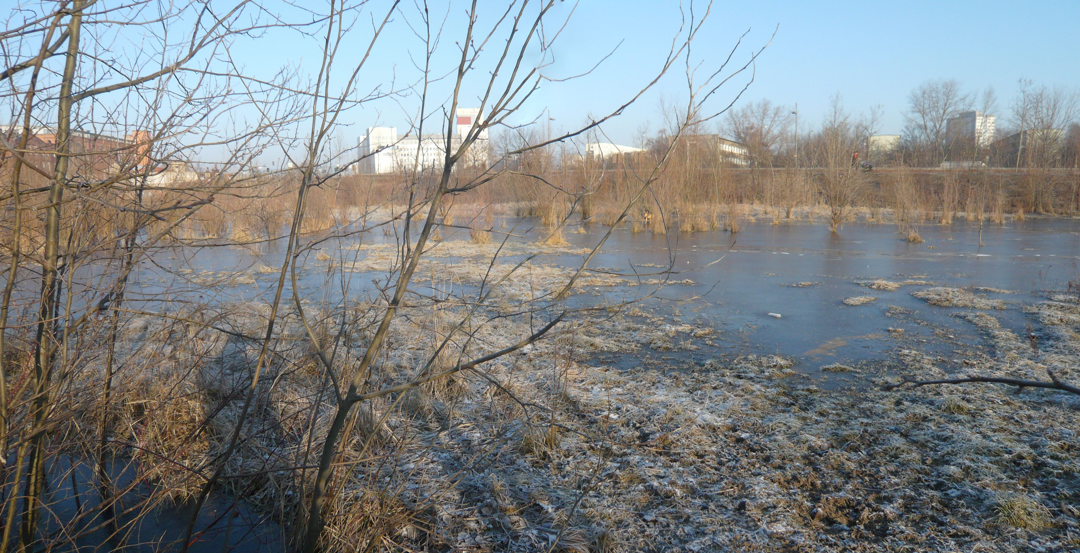 Straße in Berlin-Prenzlauer Berg, Entw.gebiet Alter Schlachthof, Brachfläche zwischen Erich-Nehlhans- und Hermann-Blankenstein-Straße